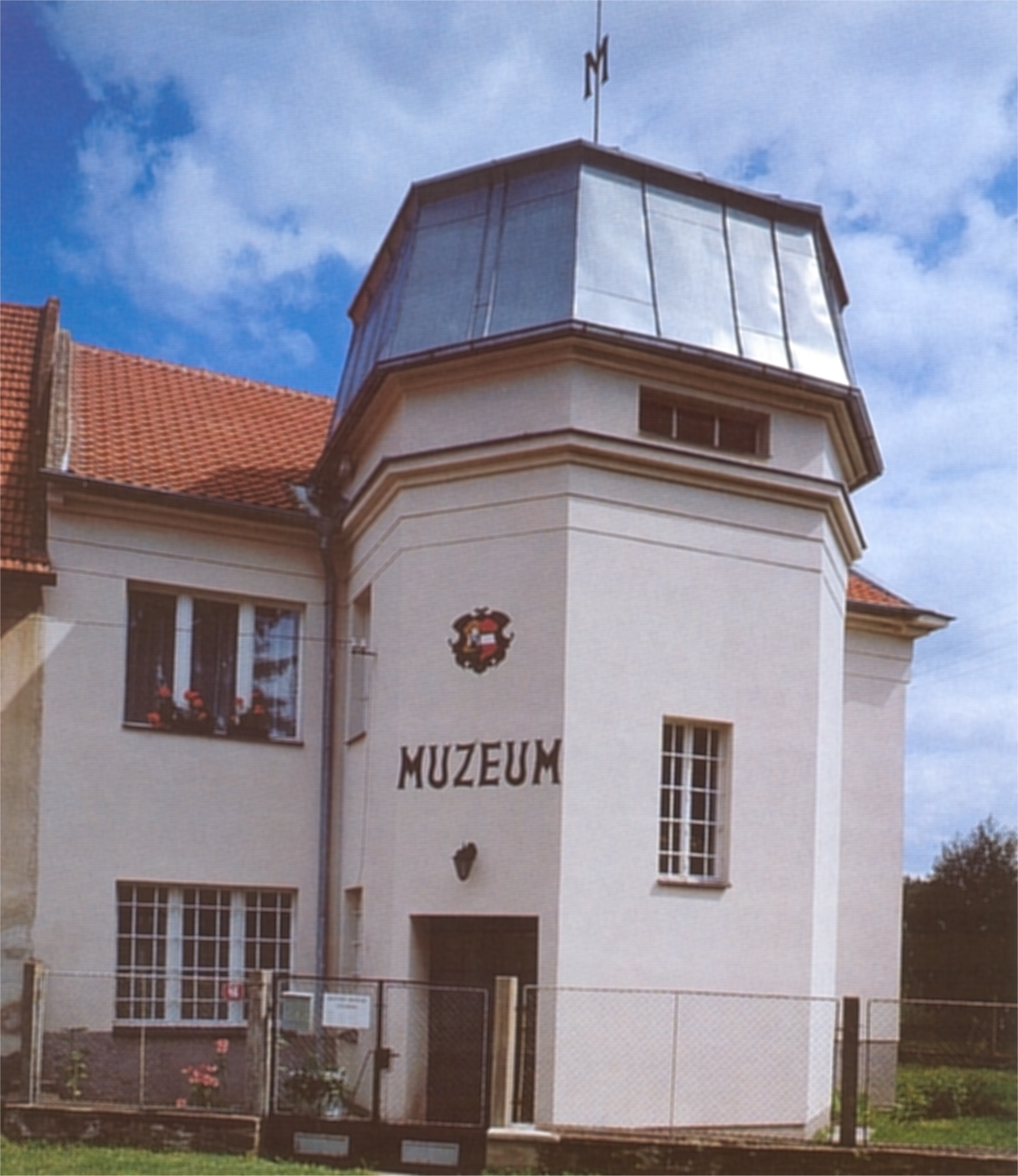 Městské muzeum Netvořice - venkovní pohled